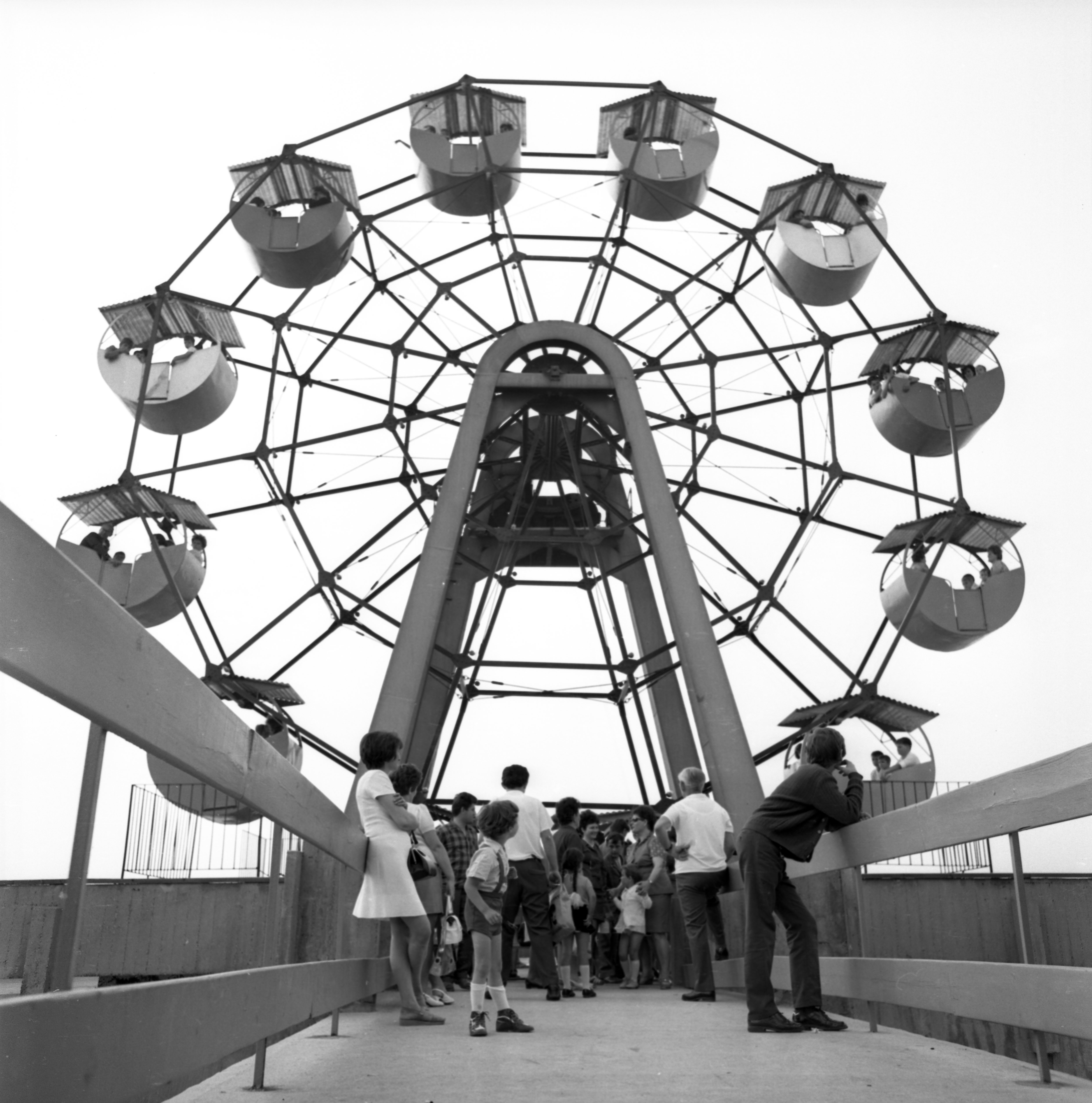 Ligetsor, Vidámpark, Óriáskerék. Location: Hungary, Székesfehérvár Tags: amusement park, Ferris wheel Title: Ligetsor, Vidámpark, Óriáskerék.